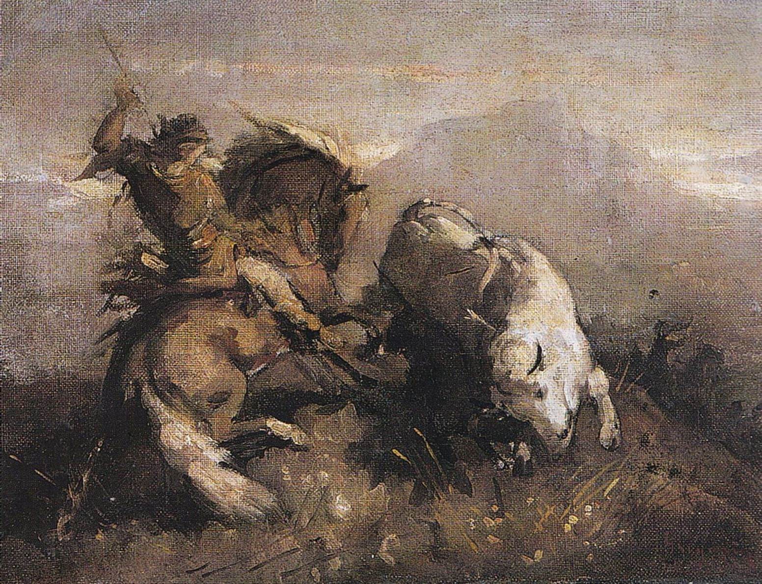 Dragoș Vodă luptând cu zimbrul - de Nicolae Grigorescu, Muzeul Național de Artă al României